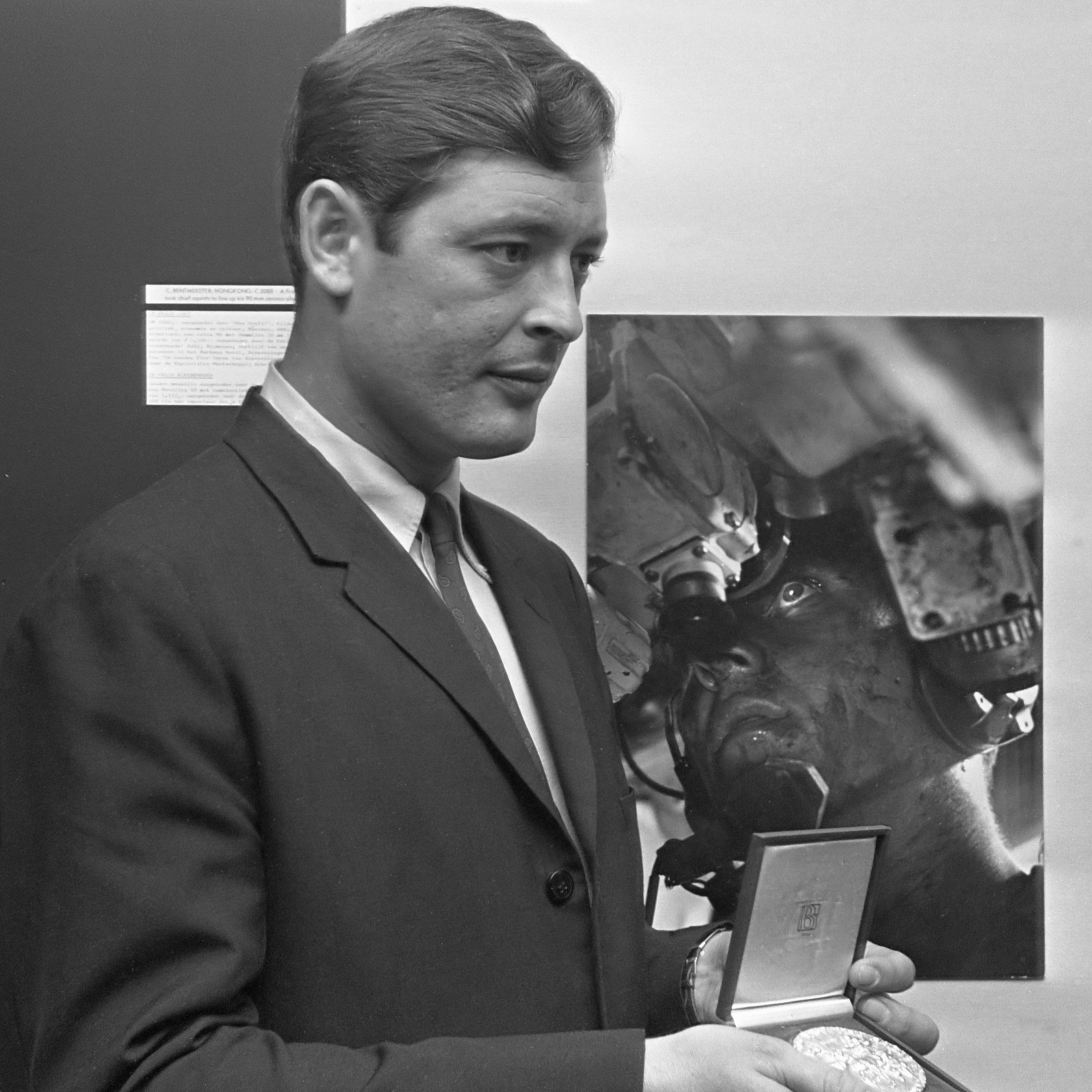 World Press Photo 1967 te Den Haag, winnaar Co Rentmeester met medaille bij zijn foto 16 december 1967